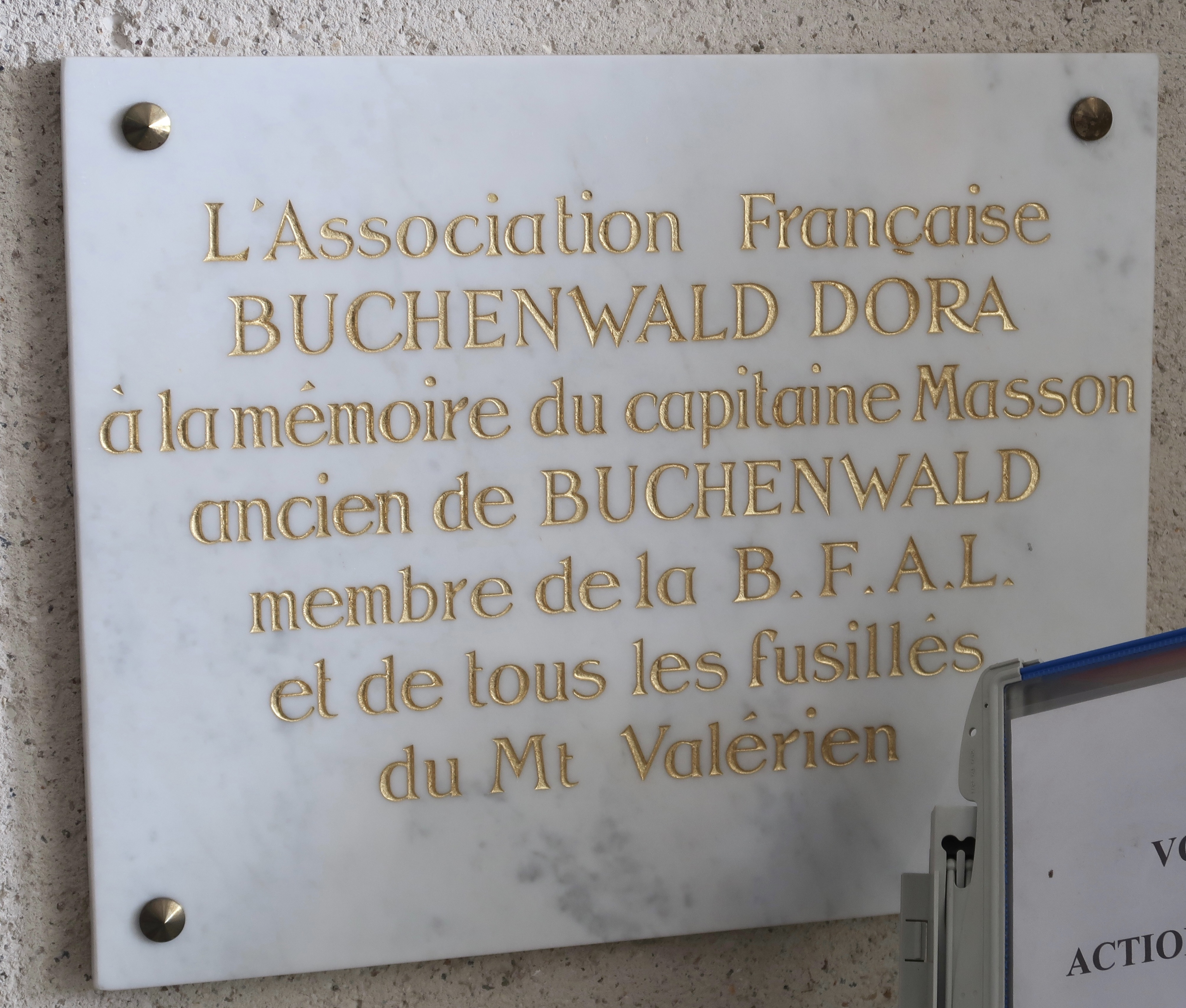 Plaque en hommage au capitaine Masson et aux fusillés du Mont-Valérien, au musée des transmissions du Mont-Valérien à Suresnes (Hauts-de-Seine).